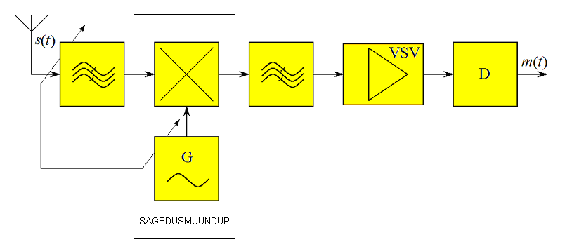 Superheterodüünvastuvõtja põhimõtteskeem. Originaalile on lisatud raam, mis eristab sagedusmuundurit.